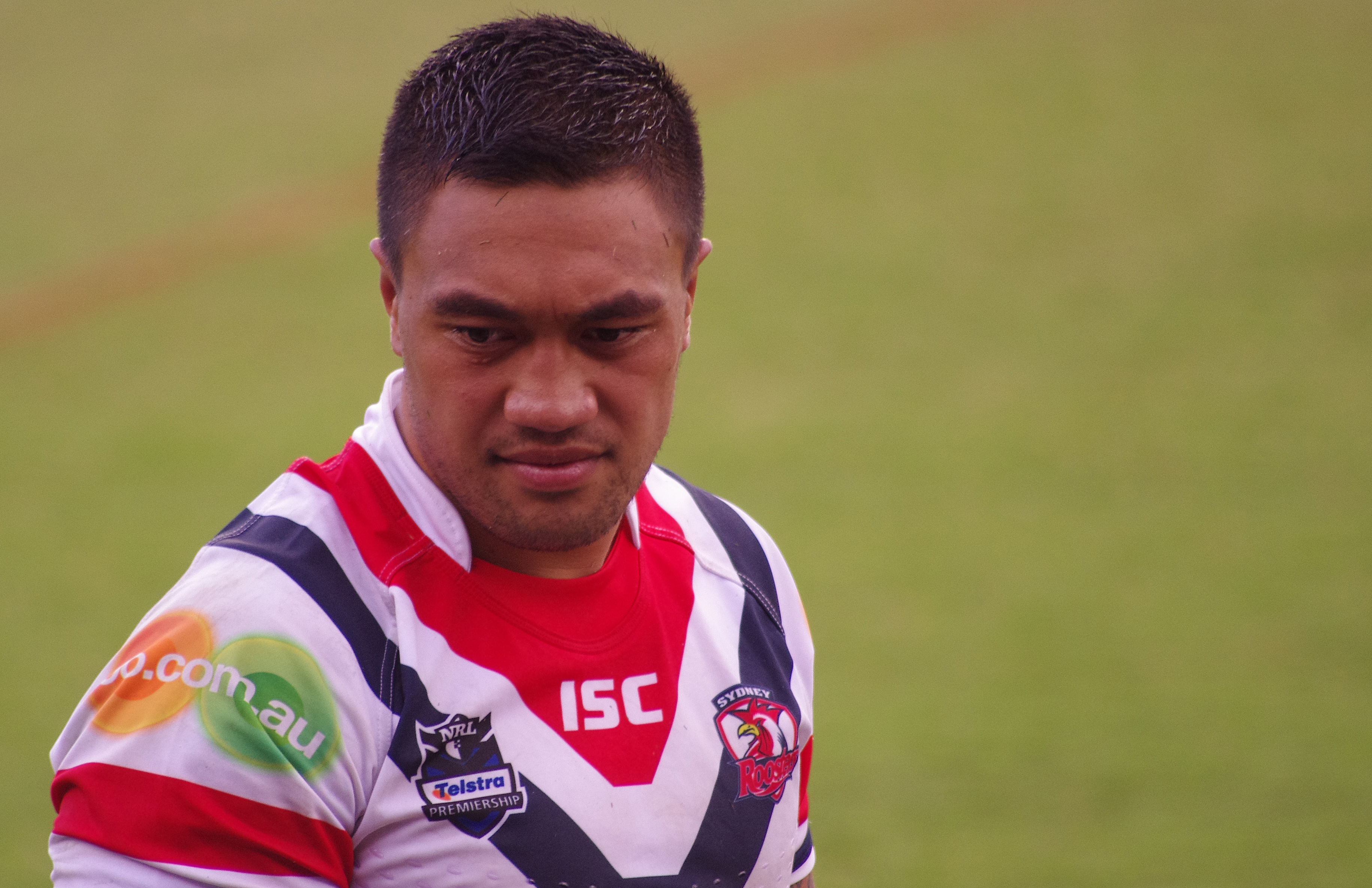 Tinirau arona